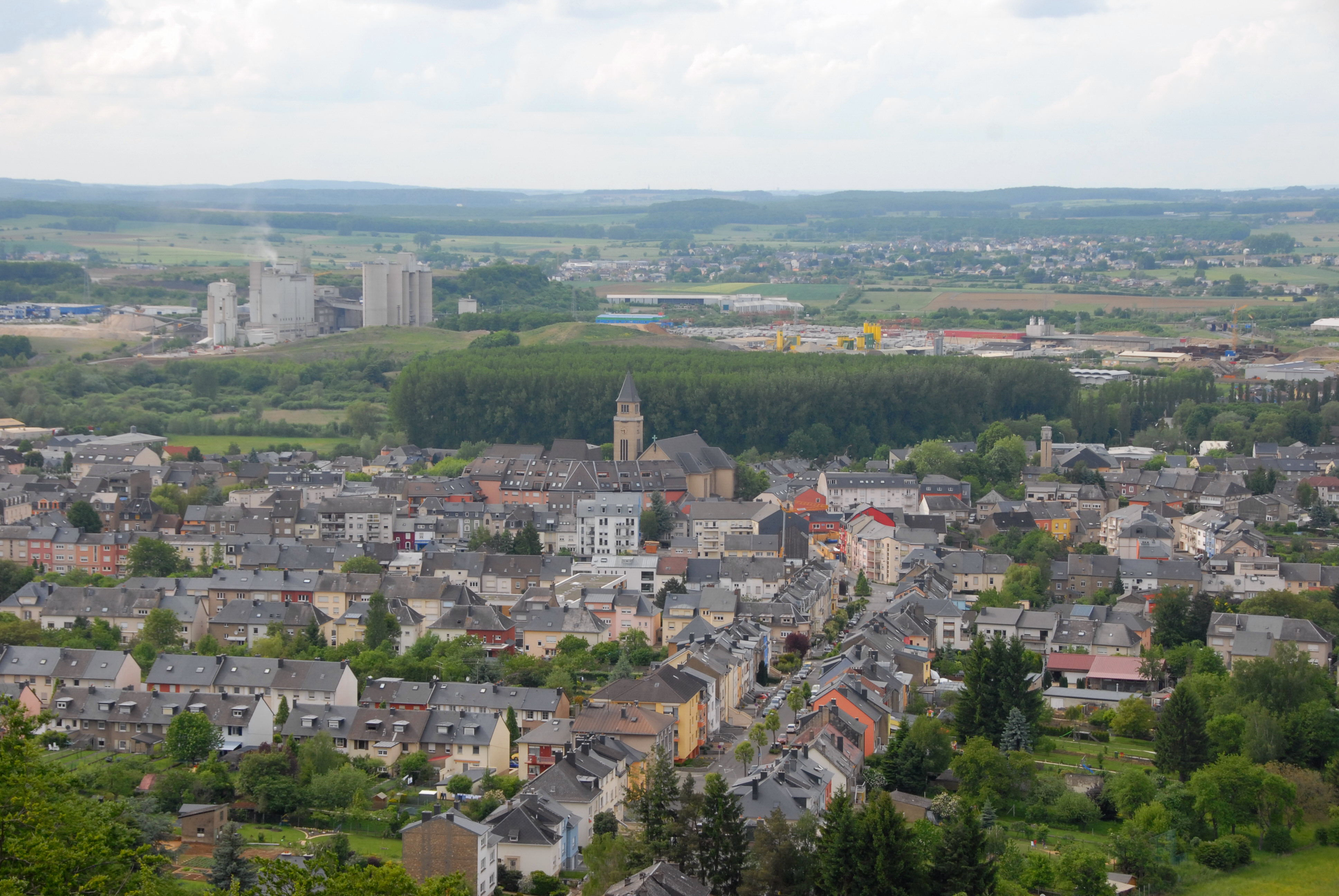 Vue op Schëffleng vum schëfflenger Bierg, Aussichtspunkt Plakeg Kopp, aus gesinn. Scheffleng Scheffleng